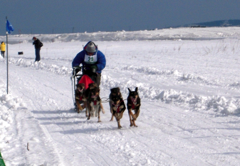 JAPAN CUP 全国犬ぞり稚内大会、第27回大会の写真